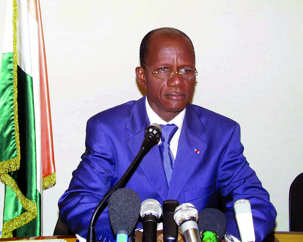 Émile Boga Doudou, ancien ministre d'État, ministre de l'Intérieur de Côte d'Ivoire